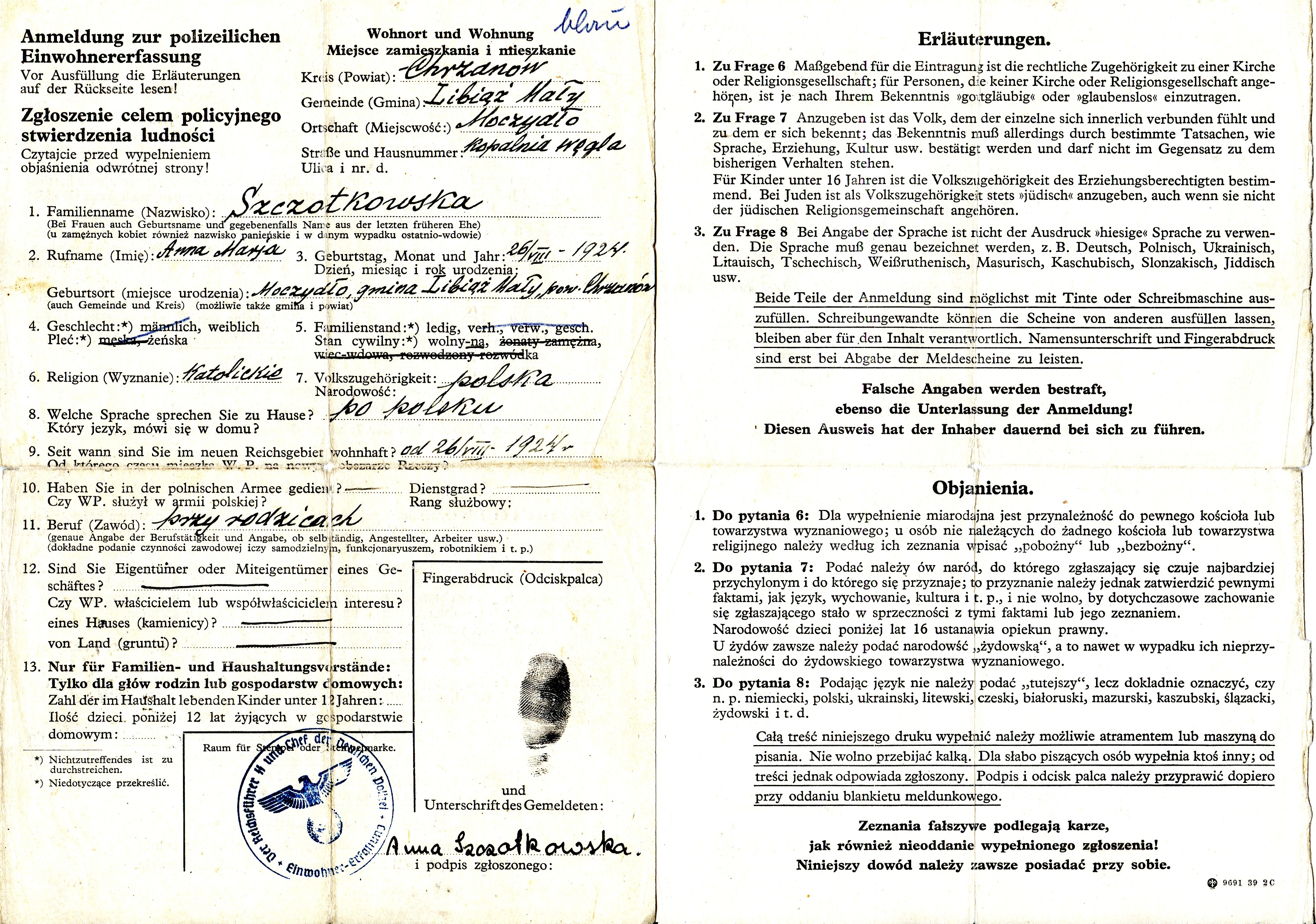 «Anmeldung zur polizeilichen Einwohnererfassung» – "Zgłoszenie celem policyjnego stwierdzenia ludności" - dokument wydawany mieszkańcom okupowanej Polski